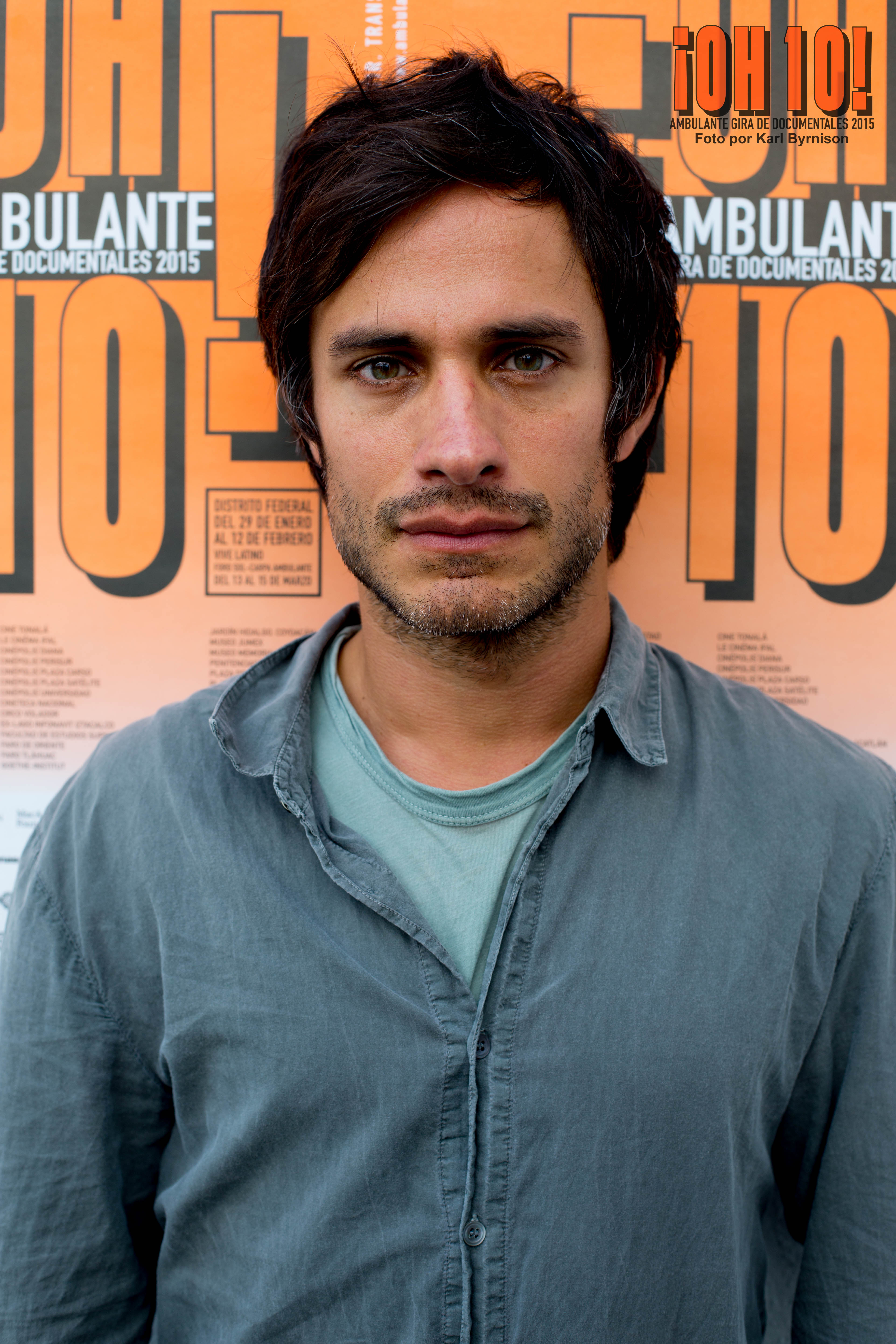 Gael García Bernal al Festival Ambulante in Messico, 2015.